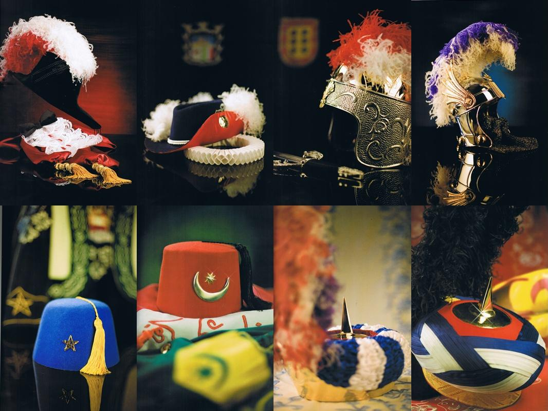 Atributos pertenecientes a las 8 comparsas que participan en las Fiestas de Moros y Cristianos en honor a San Blas (Sax).